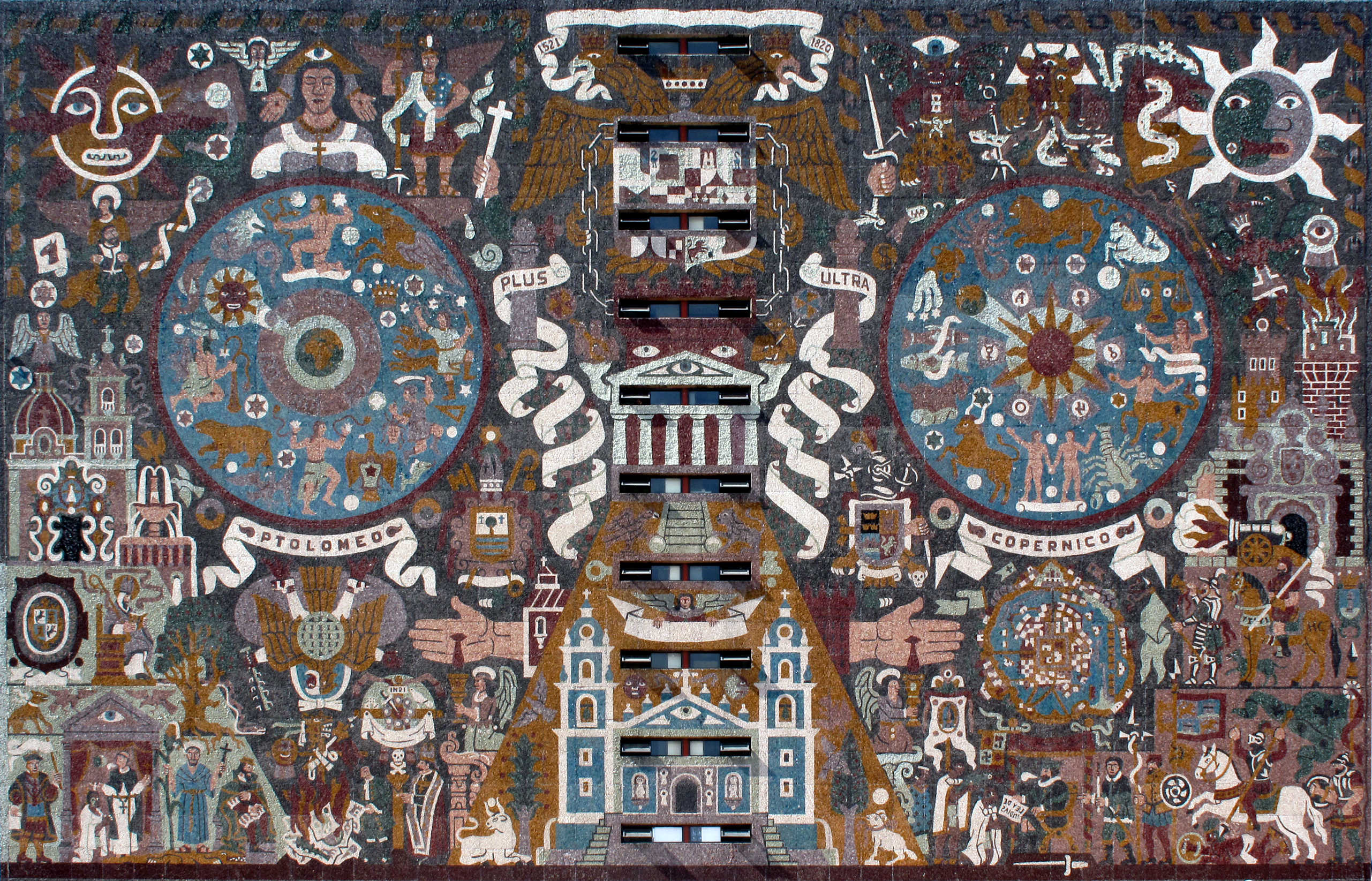 Detalle de la Fachada principal (Muro Sur) de la Biblioteca Central de la Universidad Nacional Autónoma de México, obra del arquitecto Juan O'Gorman.